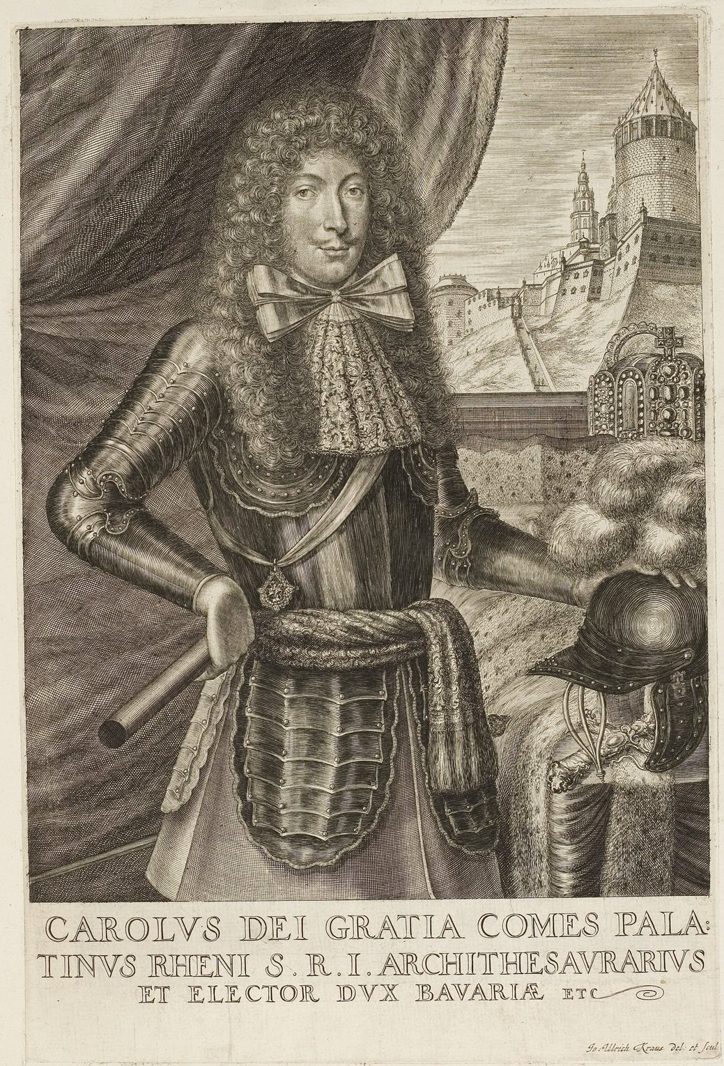 Grafik aus dem Klebeband Nr. 1 der Fürstlich Waldeckschen Hofbibliothek Arolsen Motiv: Karl II. von der Pfalz